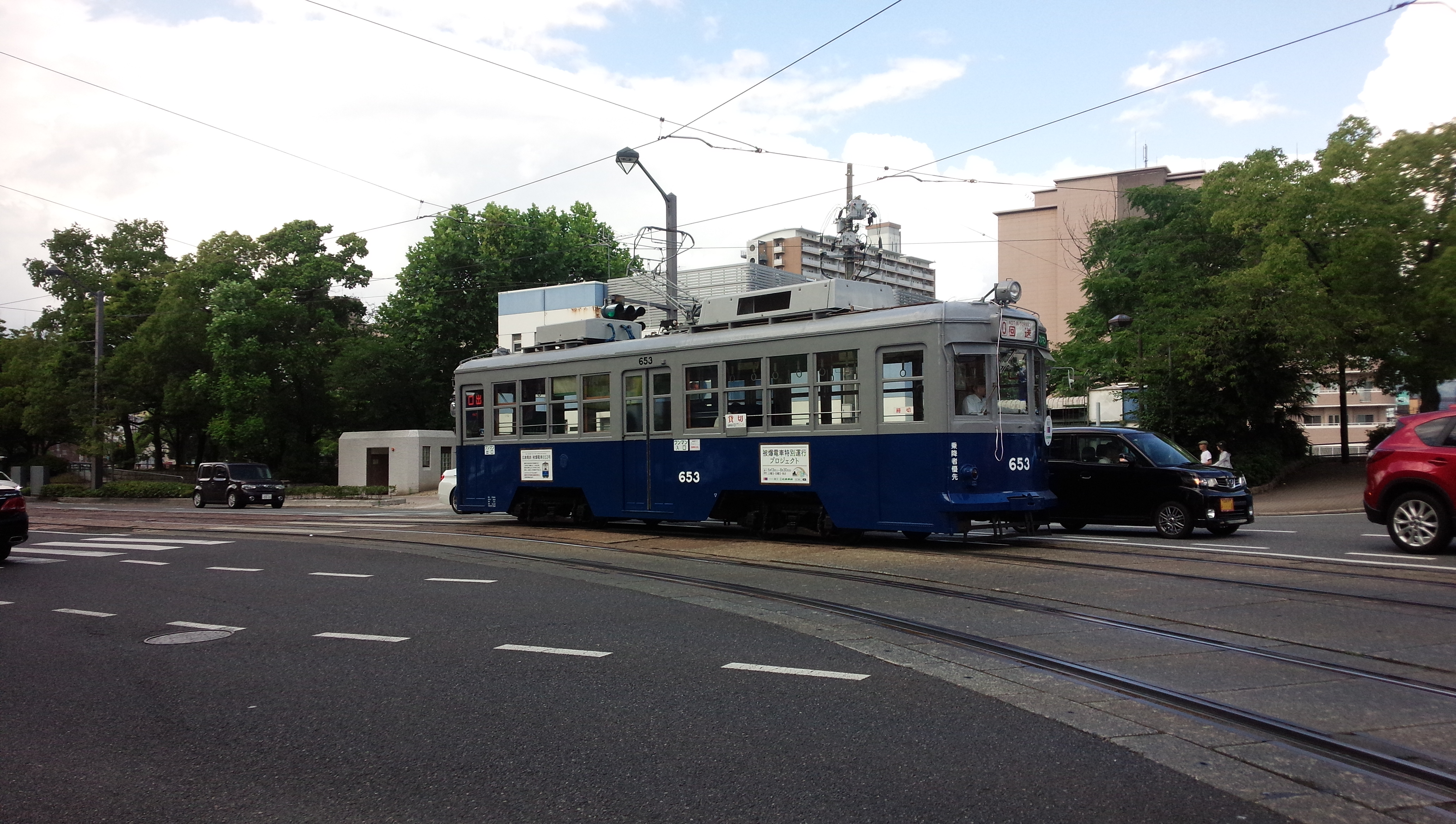 広島電鉄650形電車653号